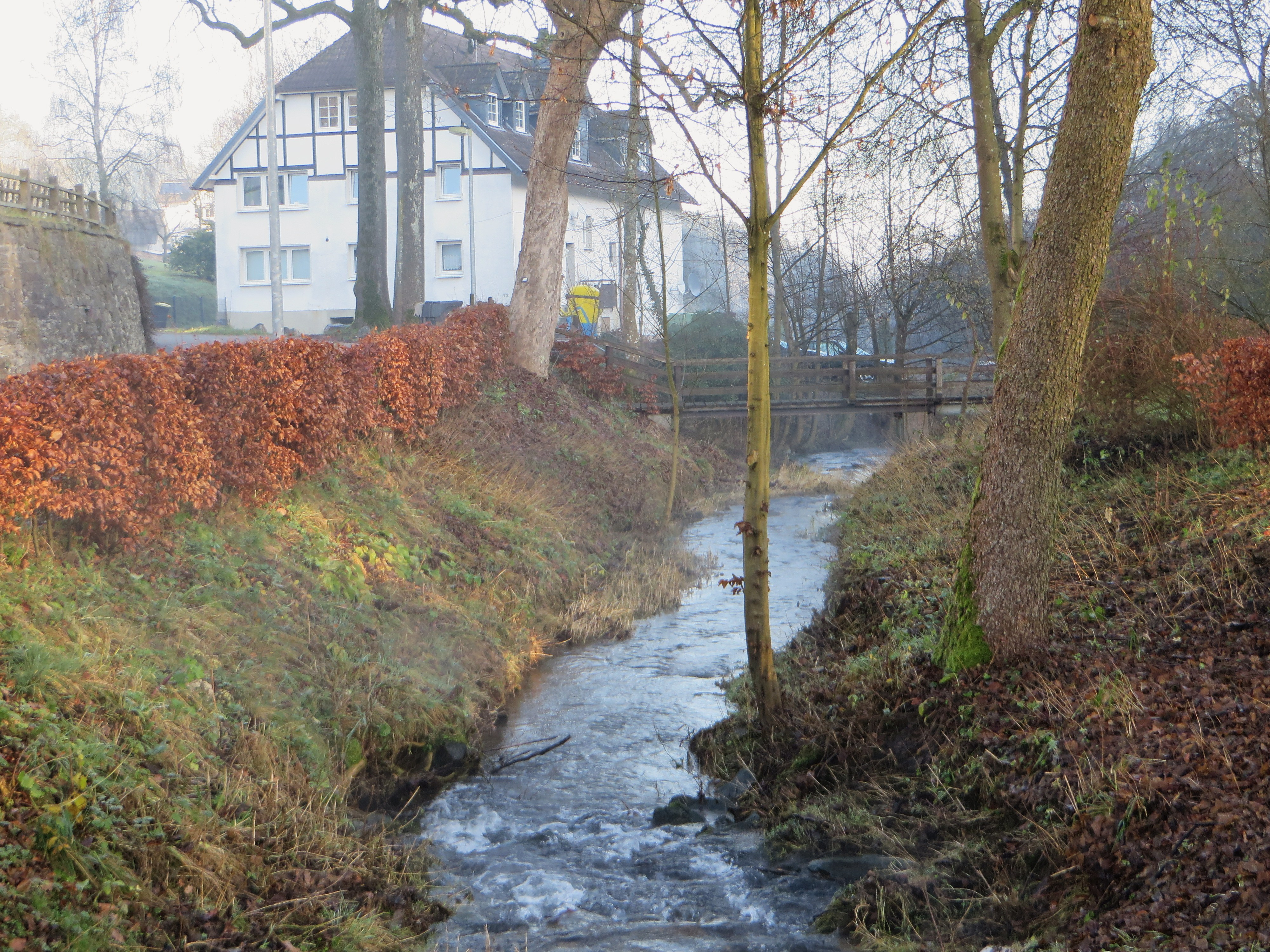 Der Bach Repe im Attendorner Ortsteil Repe an der Repetalstraße. Im Morgennebel unter der Holzbrücke (Foto) Richtung Helden und Lenne unterwegs.